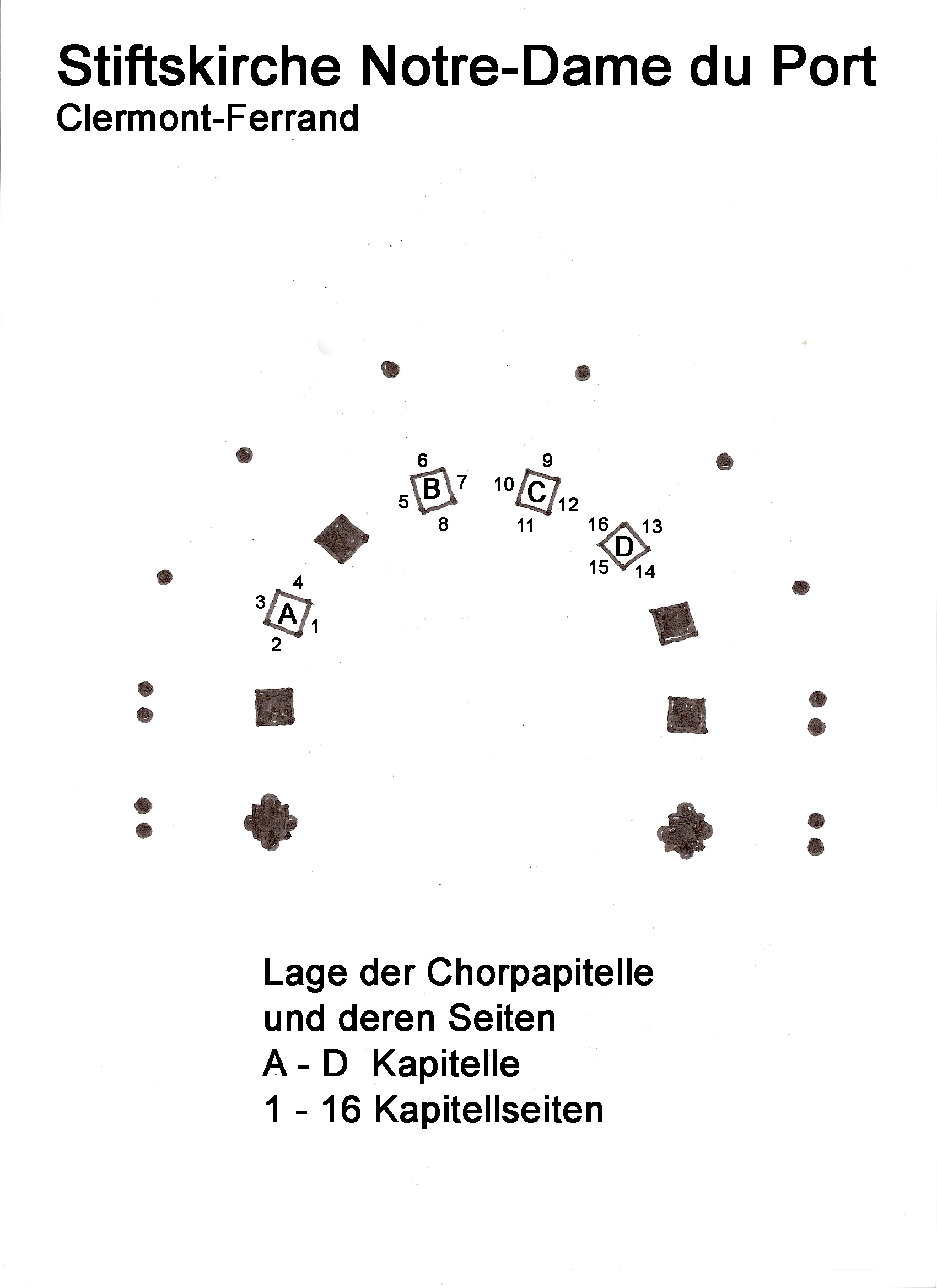 Notre-Dame du Port, Lage Kapitelle, Handskizze